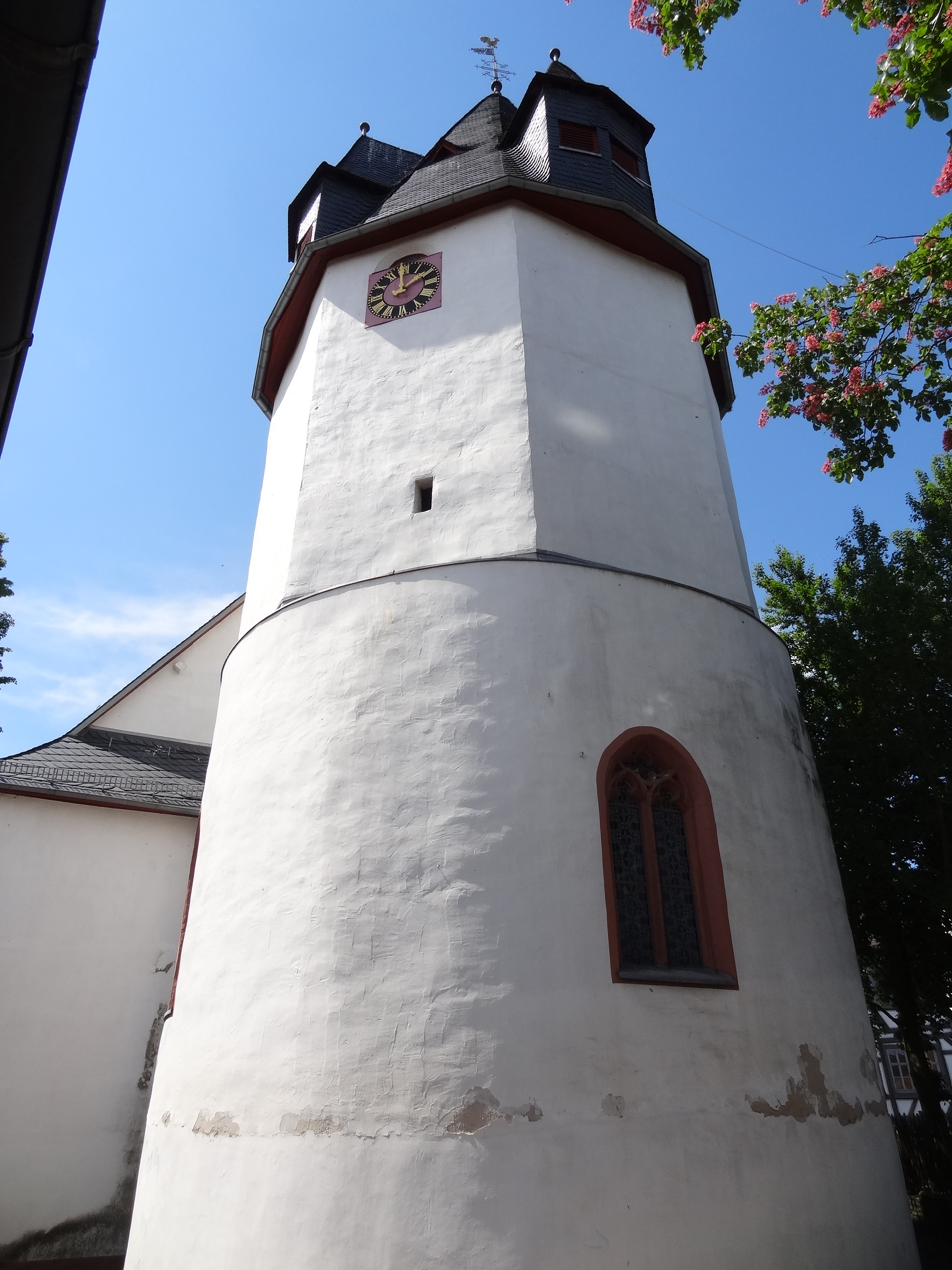 Evangelische Pfarrkirche (Hoch-Weisel)